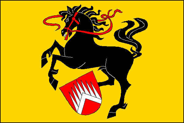 Vlajka, Rozstání, okres Svitavy